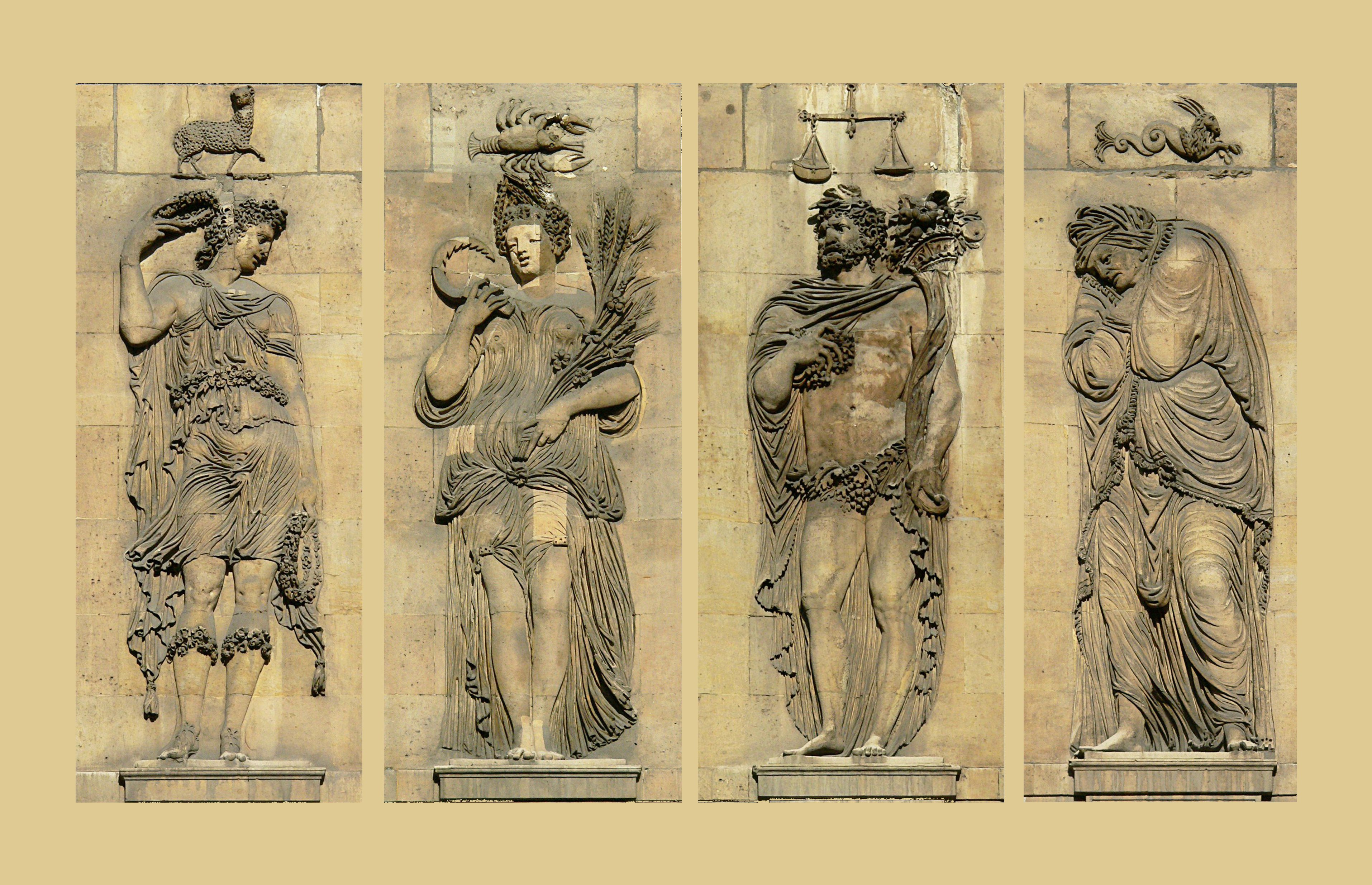 Hôtel Carnavalet, Paris. Les Quatre Saisons . Sculpteur : Jean Goujon